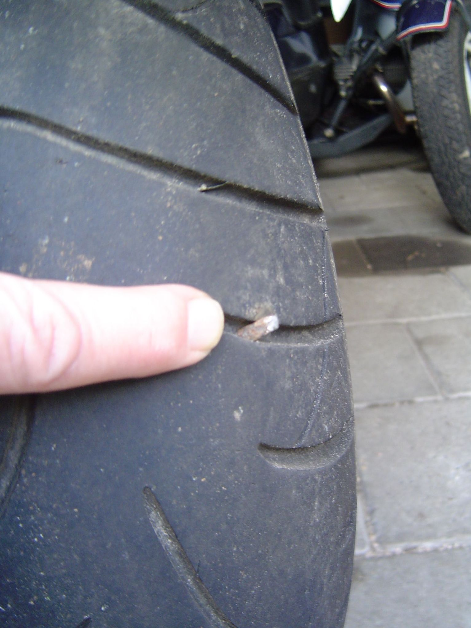 Tip: laten zitten!.